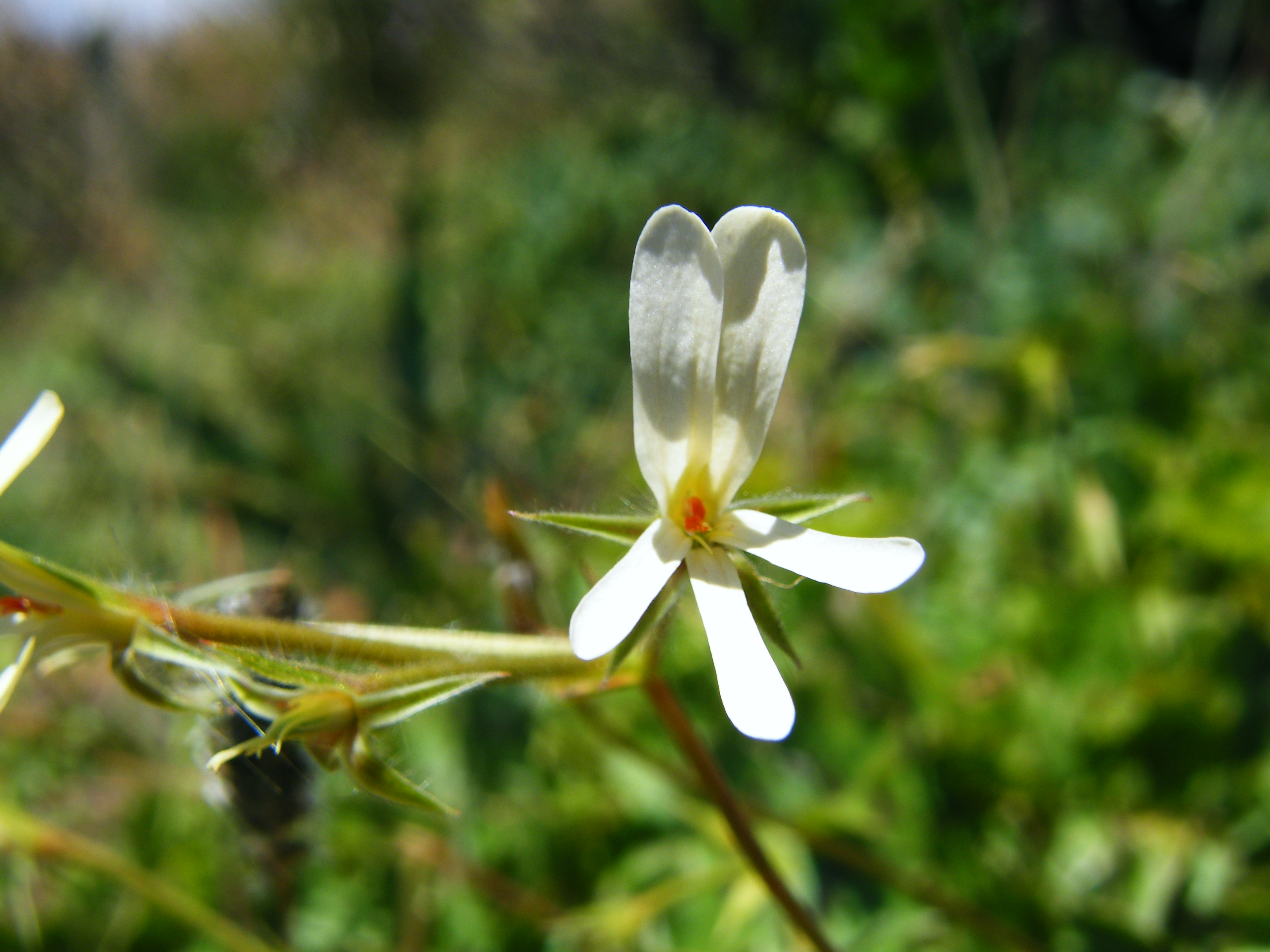 Pelargonium elongatum, Table Mountain Cape Town.